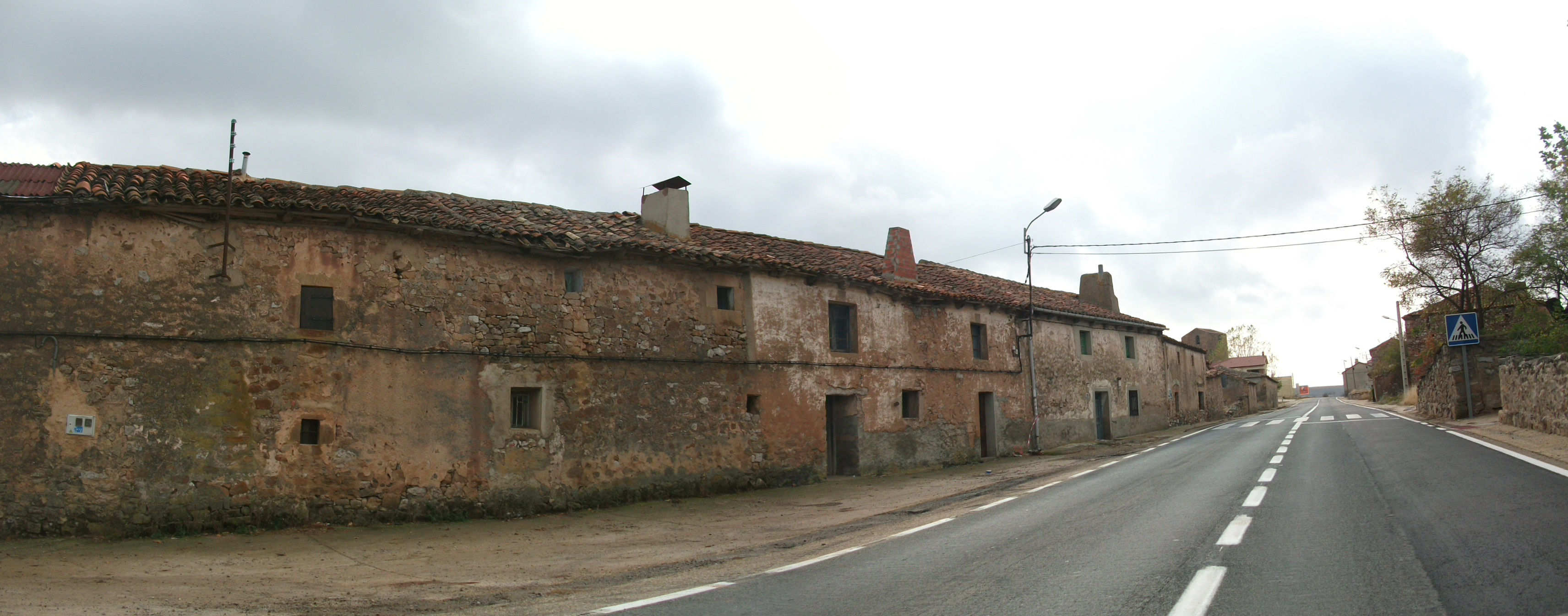 IMAGENES DEL PUEBLO